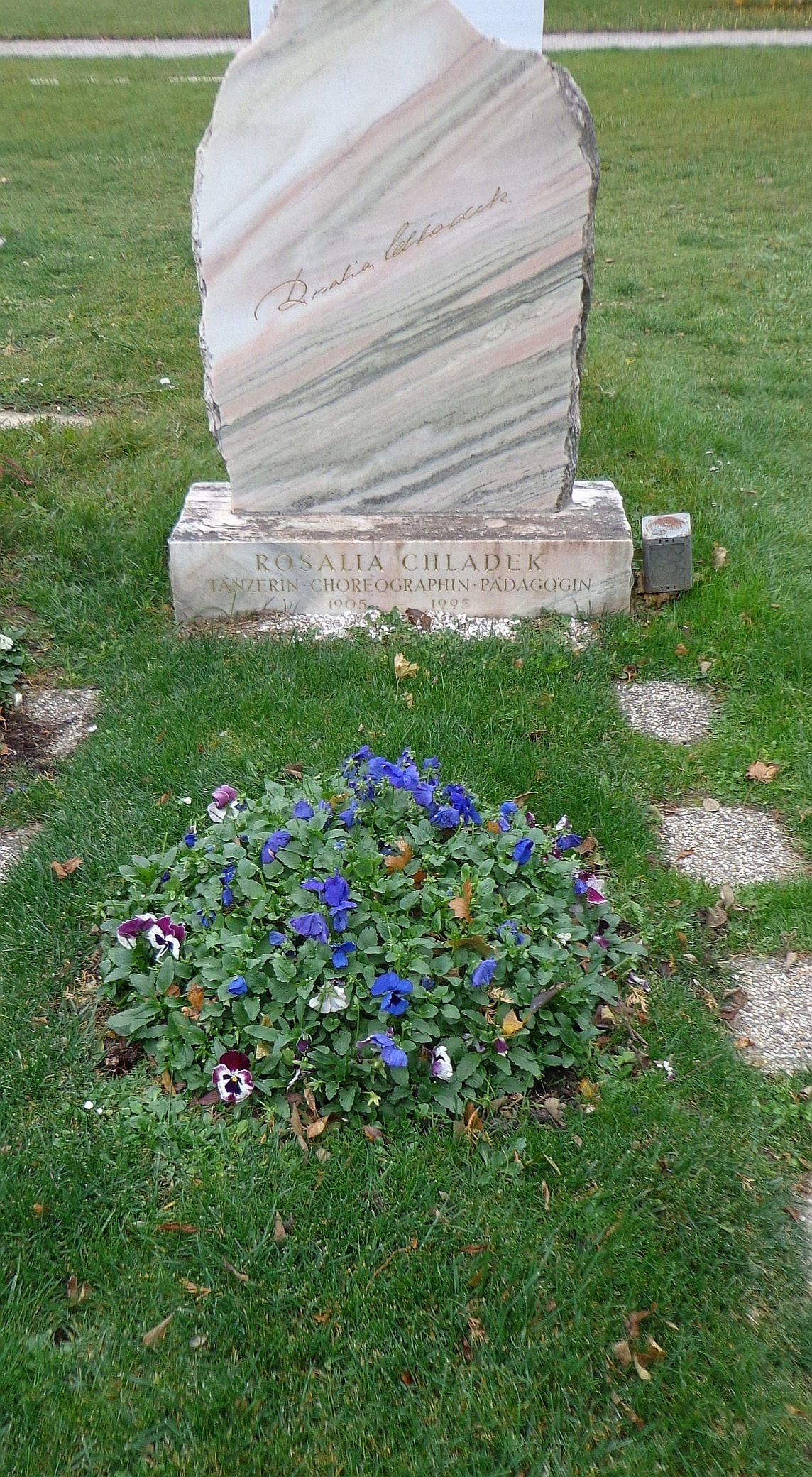 Wiener Zentralfriedhof - Gruppe 40: ehrenhalber gewidmetes Grab von Rosalia Chladek